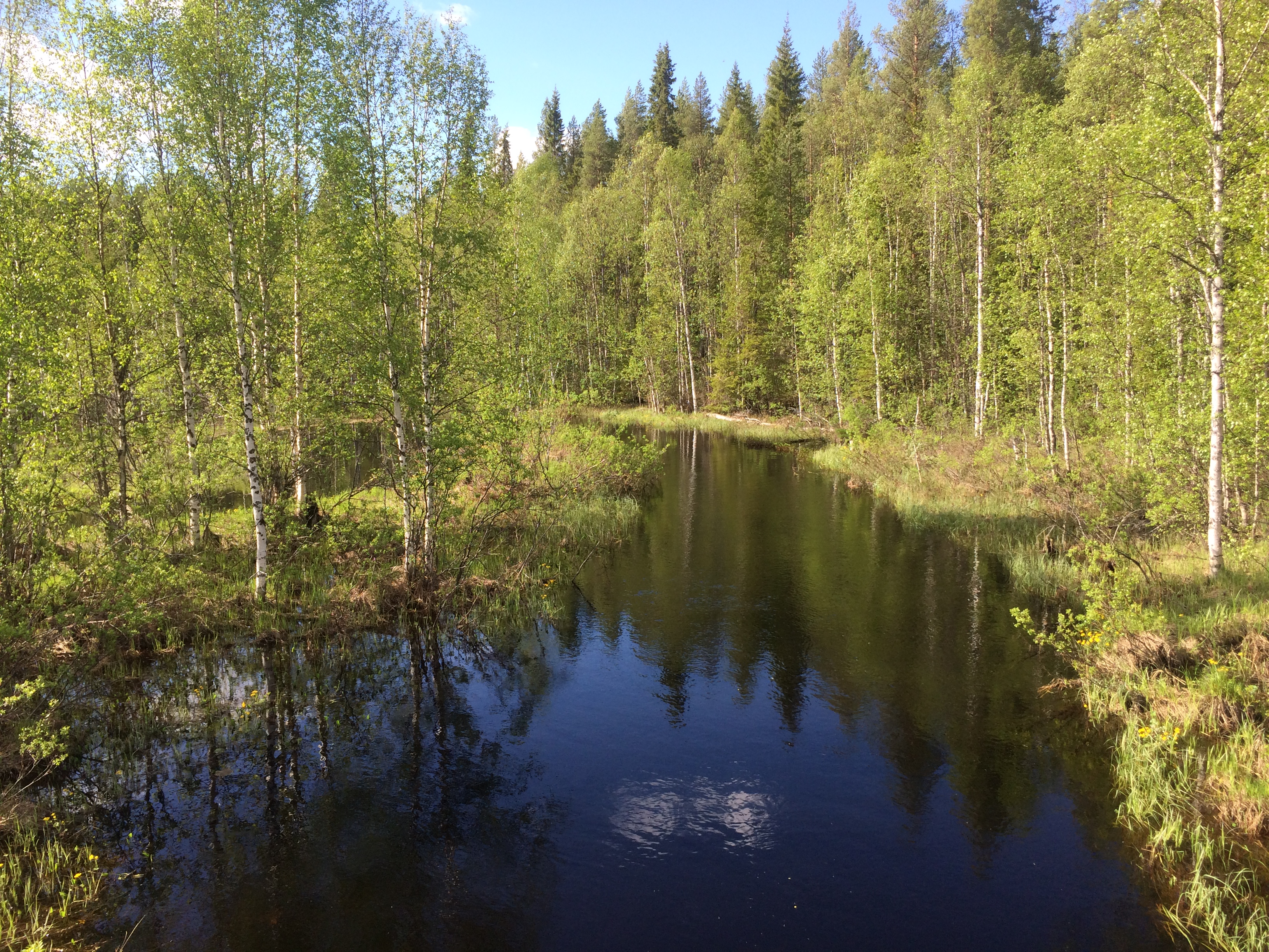 река Кулат